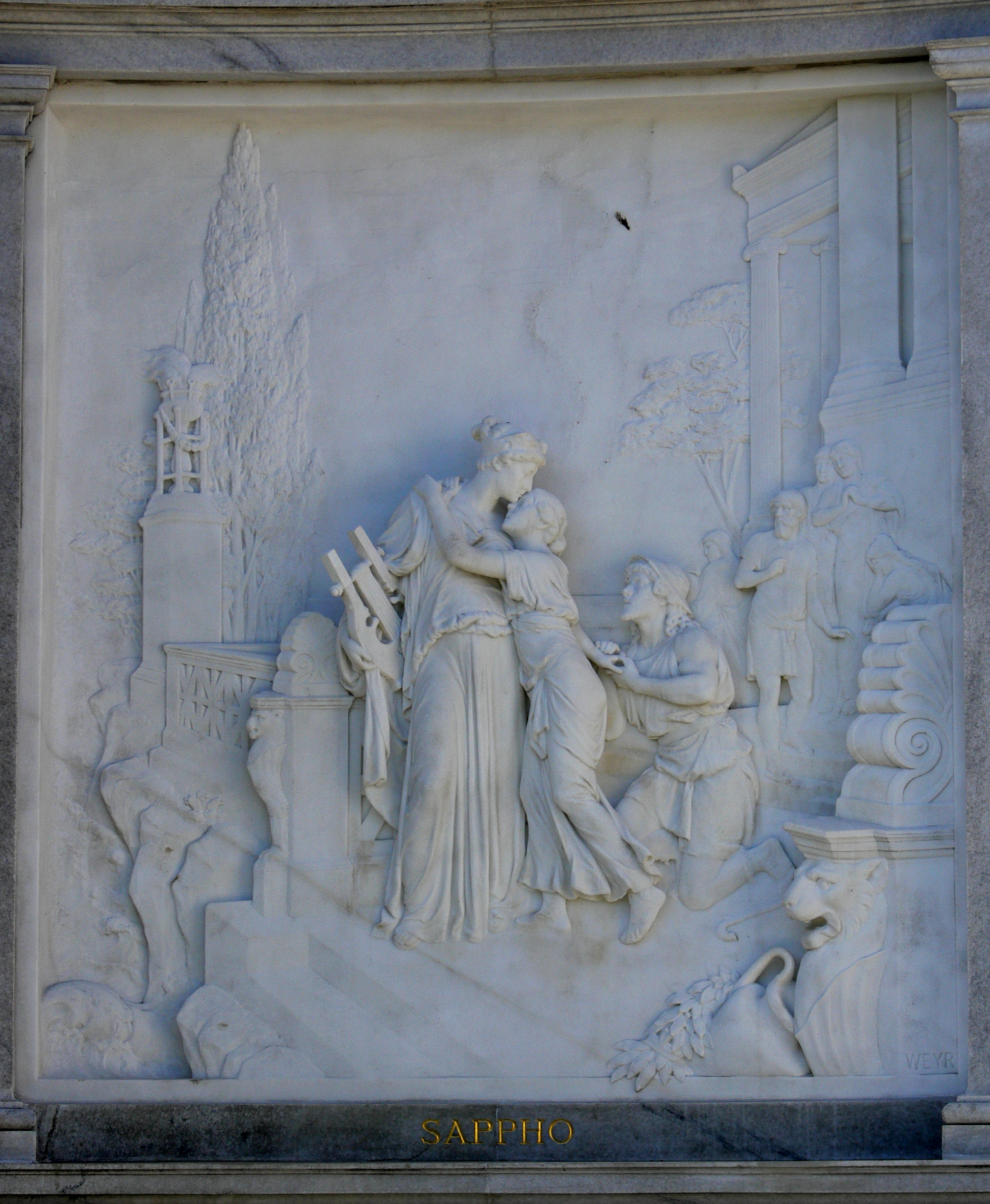 Grillparzer-Denkmal im Volksgarten, Wien, 1889 Relief "Sappho" von Rudolf Weyr